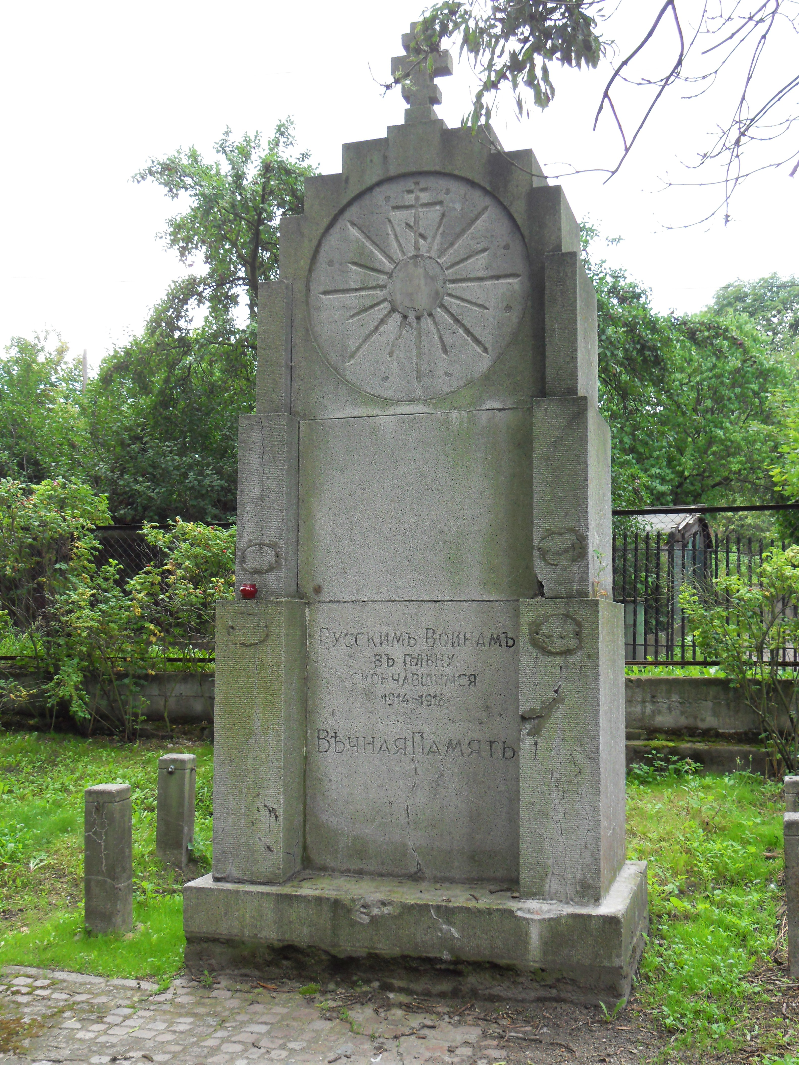 Gdańsk, Cmentarz Garnizonowy - pomnik z 1929 roku, wystawiony rosyjskim jeńcom wojennym z lat 1914-1918. Wzniesiony został przez rosyjskich emigrantów w Wolnym Mieście Gdańsku.